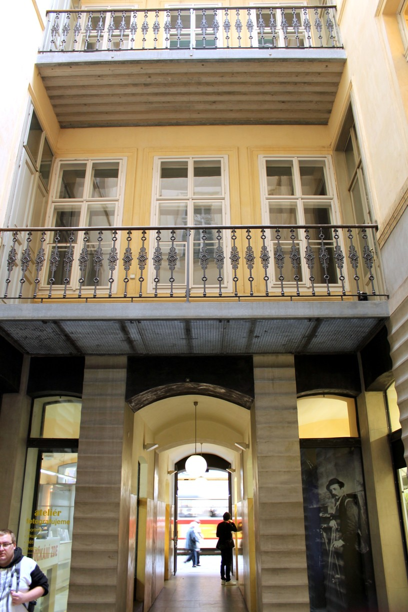 Vnitroblok paláce Langhans